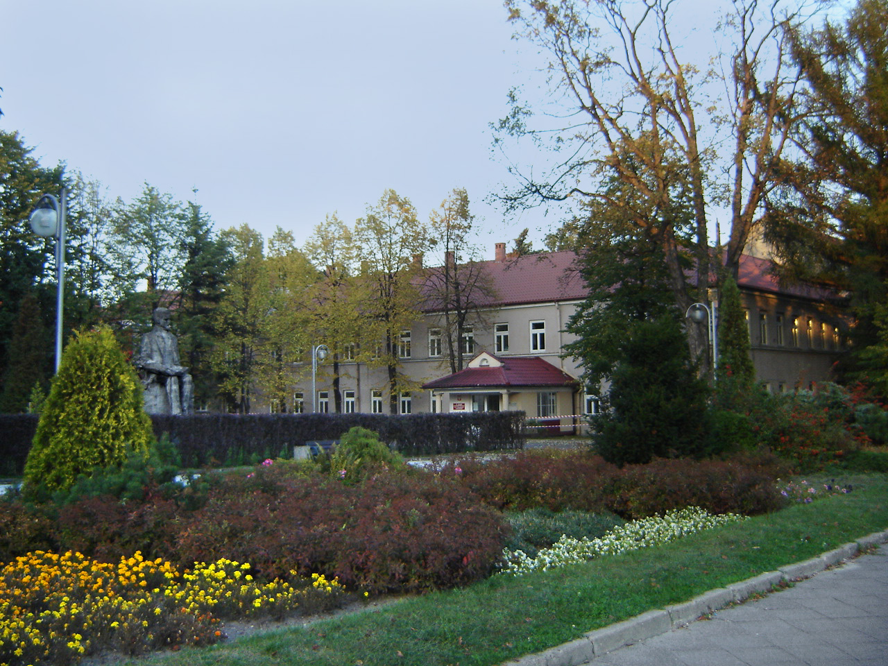 IV Liceum Ogólnokształcące im. Henryka Sienkiewicza w Częstochowie